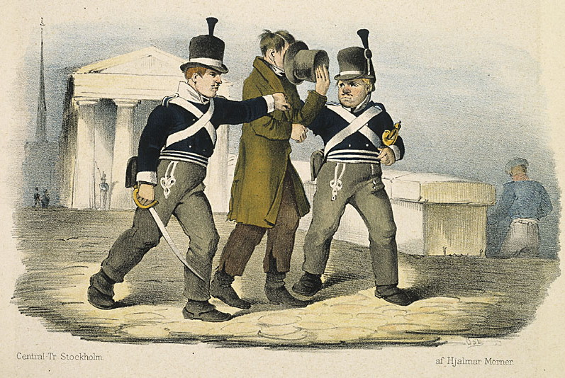 Stadsvakten (kallad "Korvarna") skötte från 1800-talets början, transporterna av manliga fångar och fungerade dessutom som brandvakter och väktare.